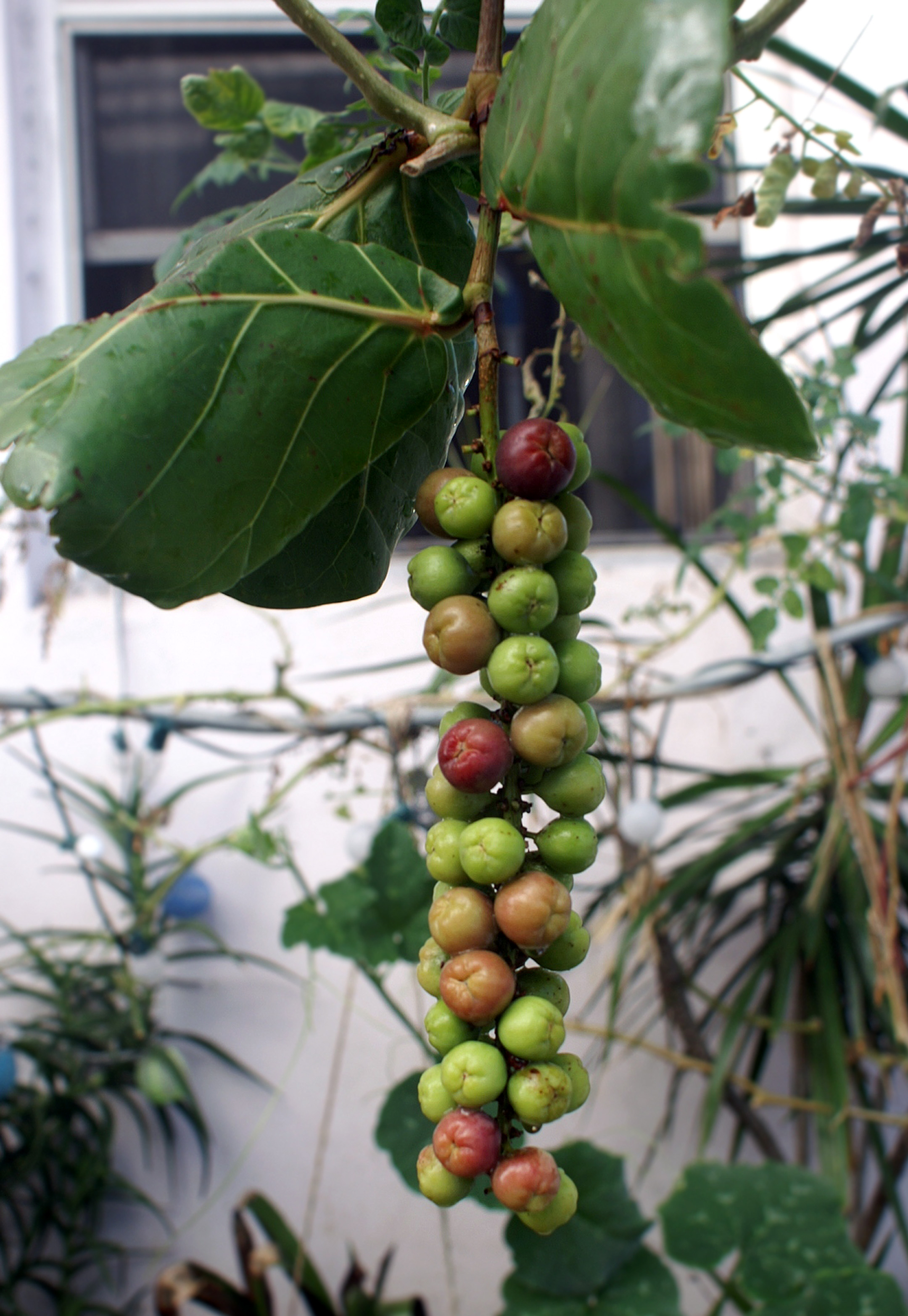 Coccoloba uvifera / Uva de playa / Sea Grape / Raisin de bord de mer.